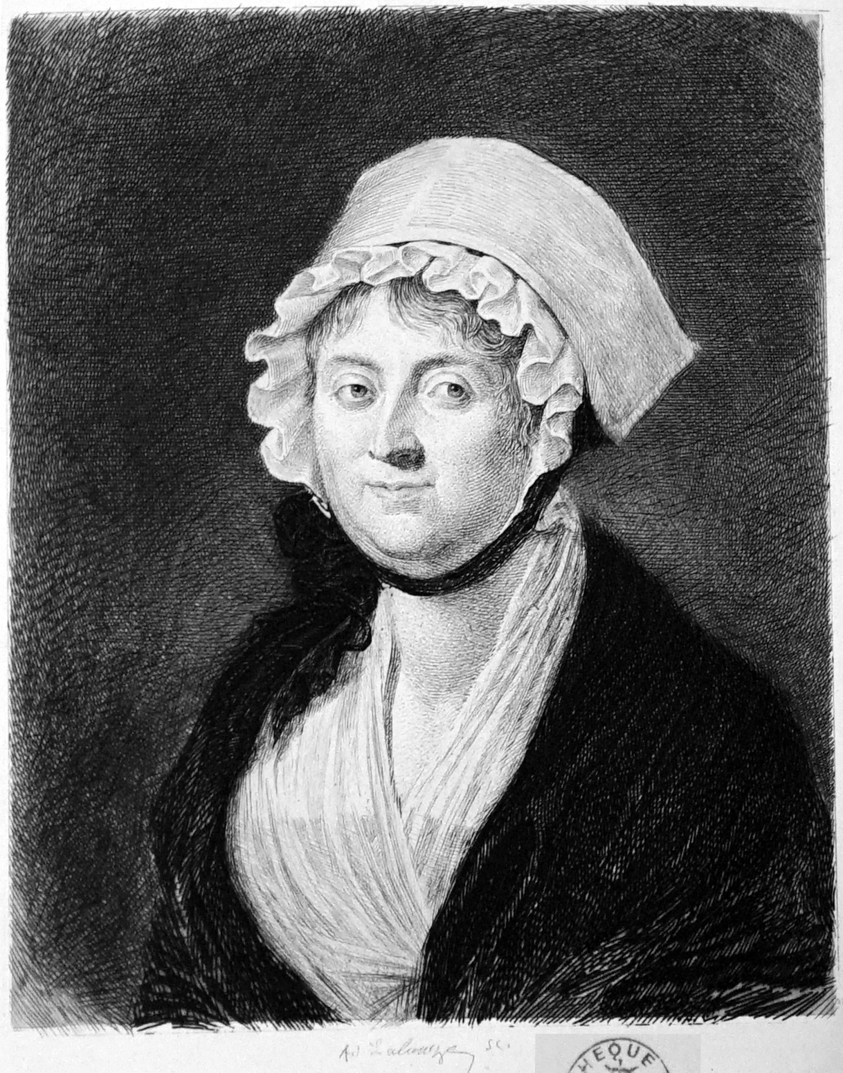 extrait des Mémoires de Madame la marquise de La Rochejaquelein".